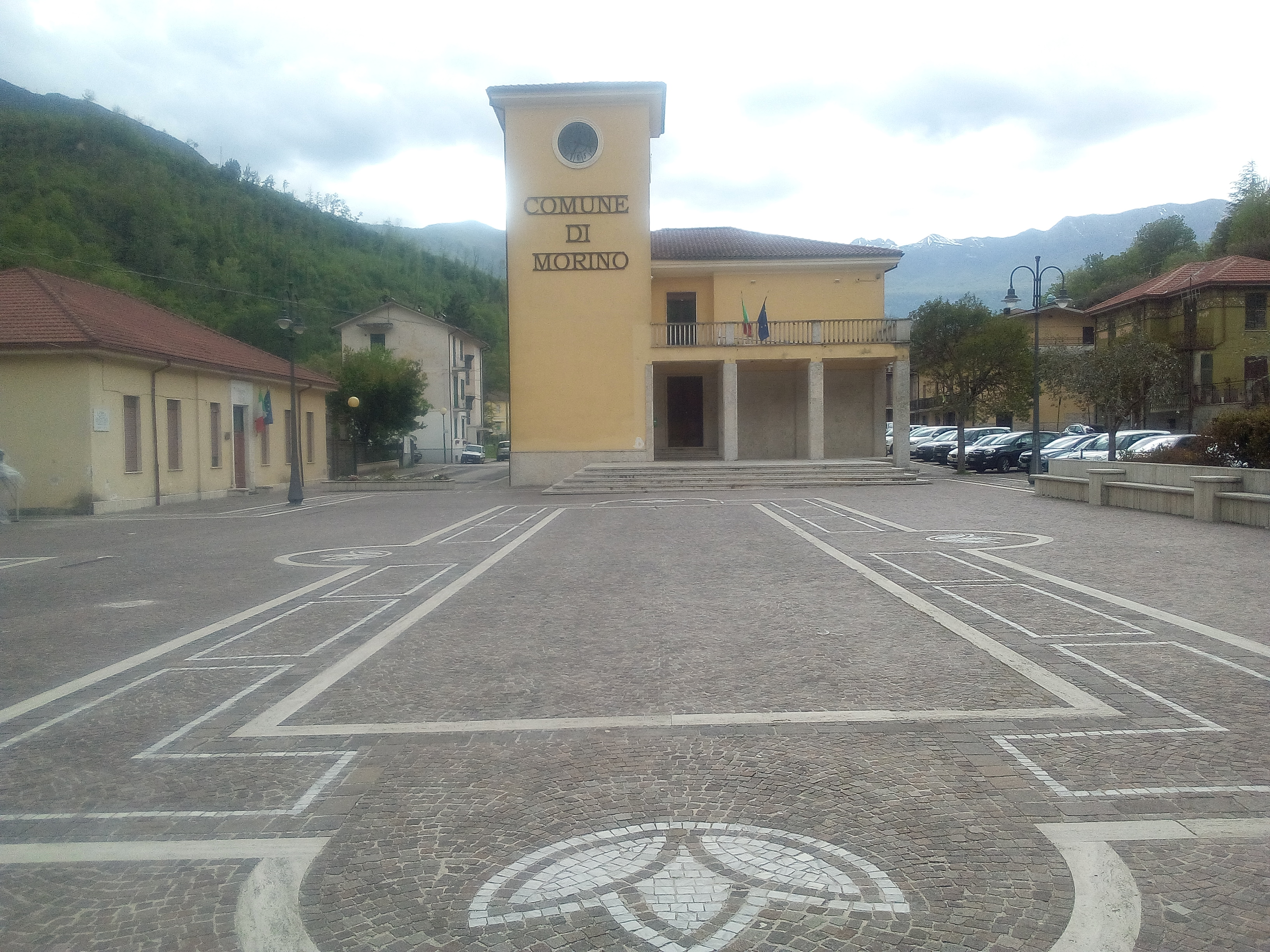 Municipio di Morino (Abruzzo)